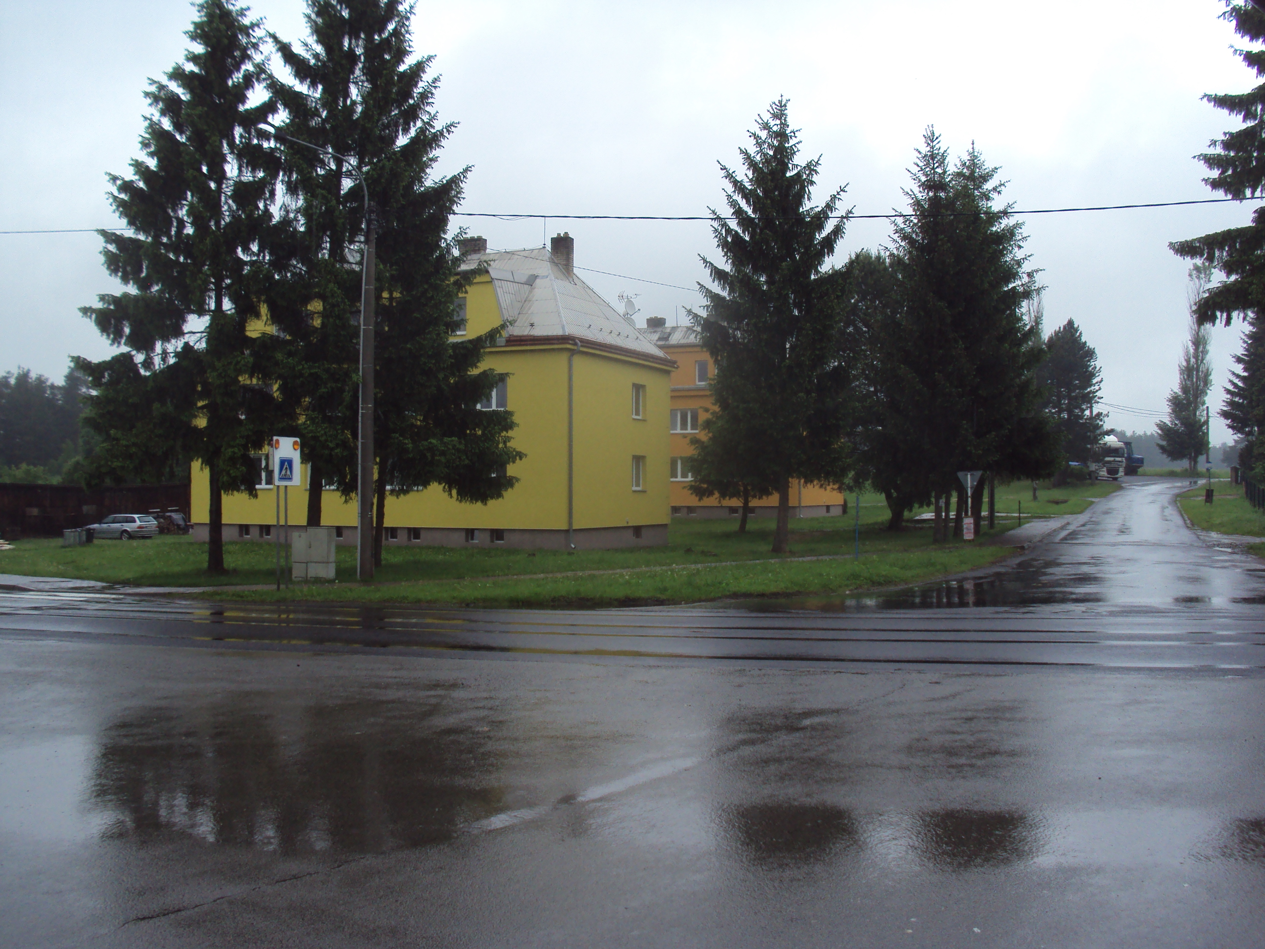 Domy v Ploužnici